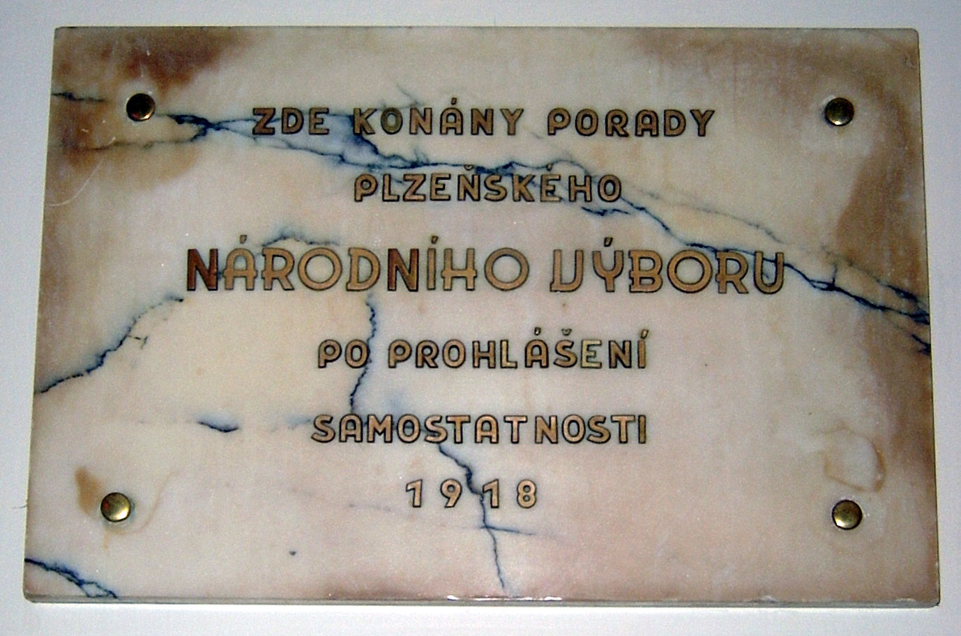 Upomínková deska v hlavní chodbě Měšťanské besedy v Plzni.